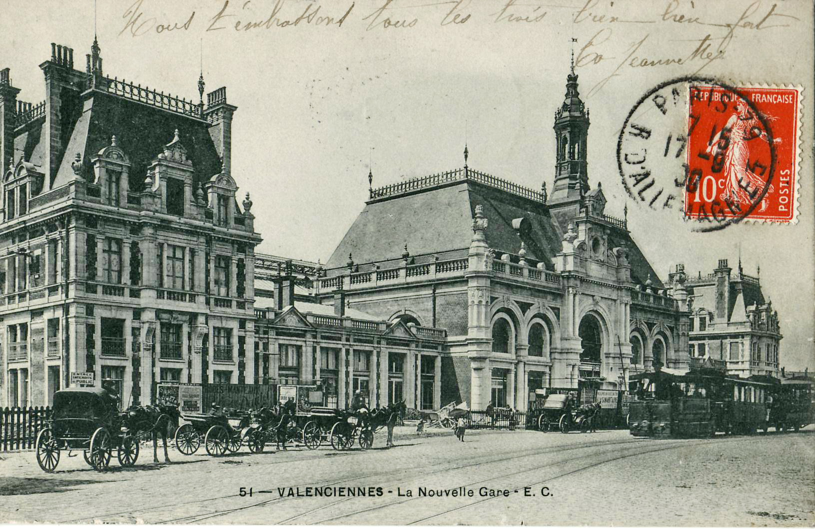 Carte postale ancienne éditée par EC, n°51 : VALENCIENNES - La nouvelle Gare